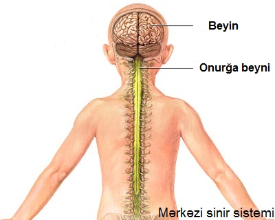 Mərkəzi sinir sistemi: beyin və onurğa beyni.